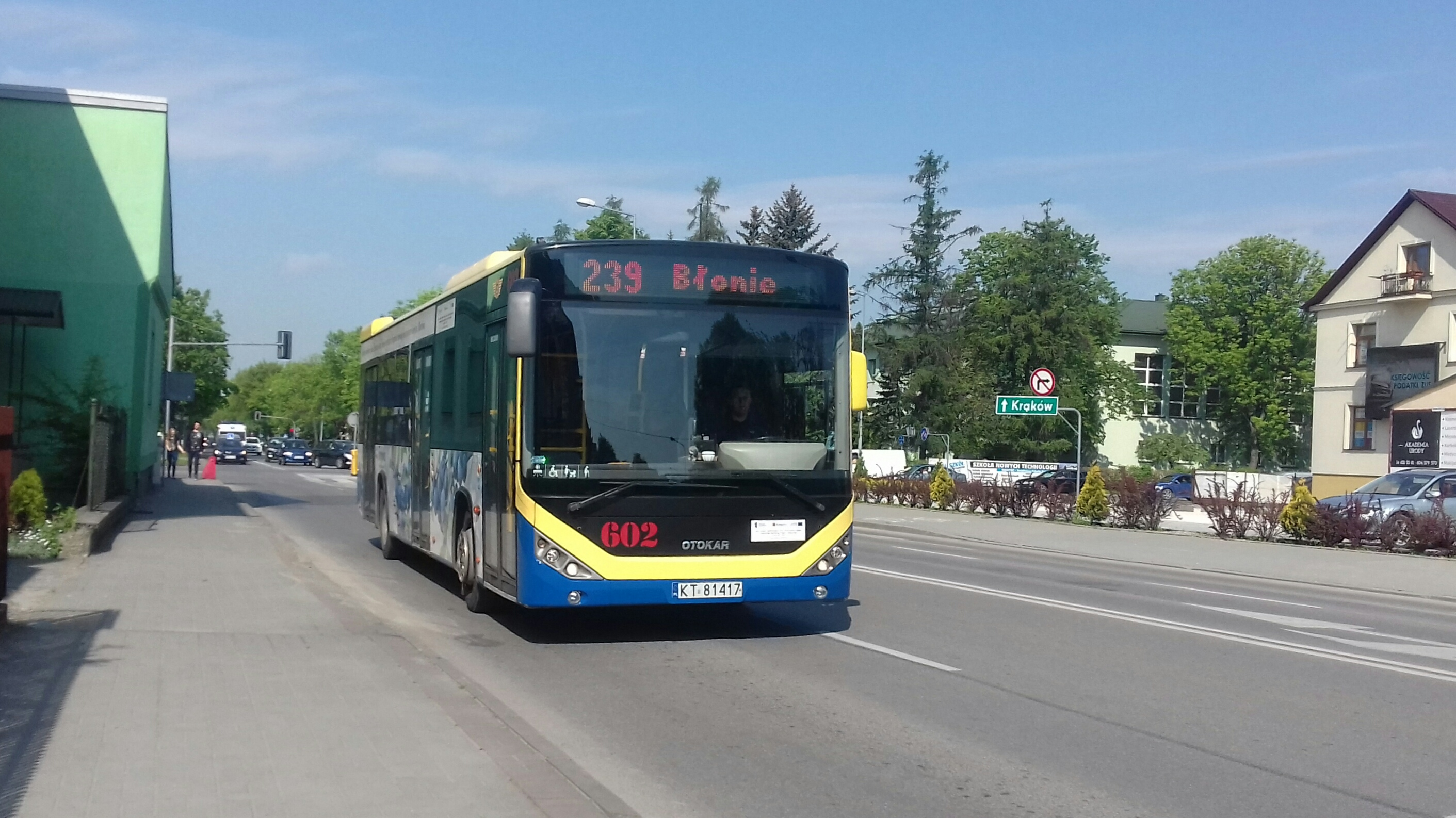 Otokar Kent 290LF MPK Tarnów